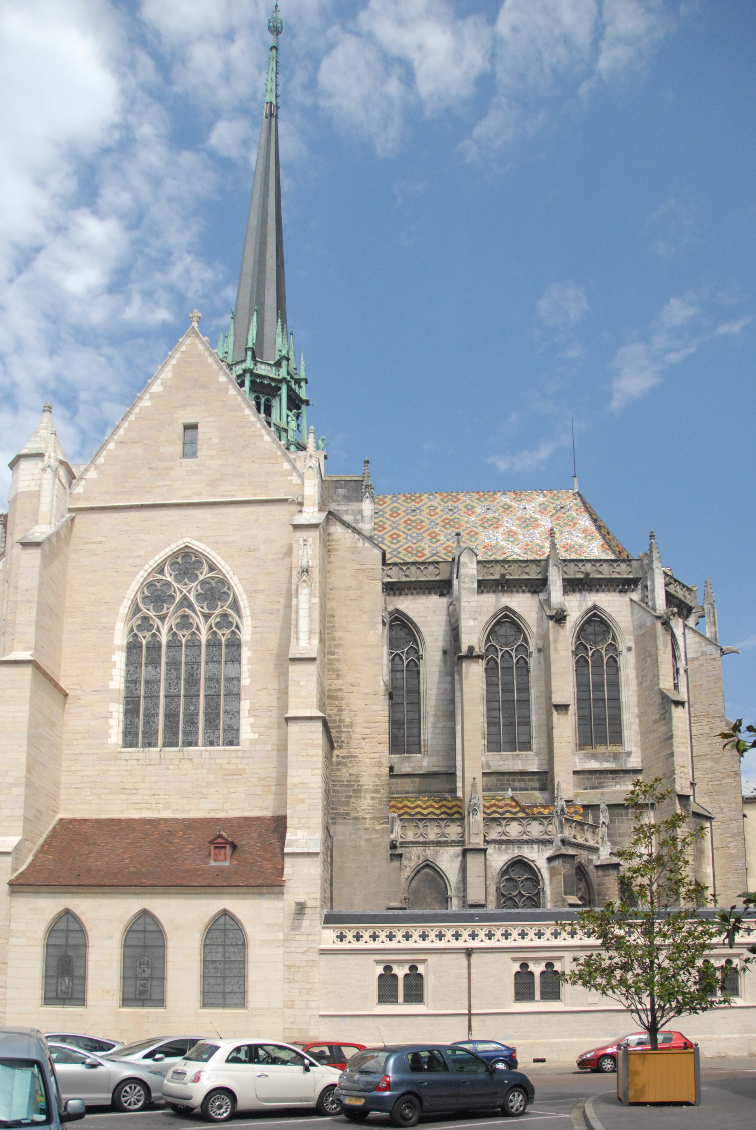 St-Bénigne, Querhaus u. Chor von SO